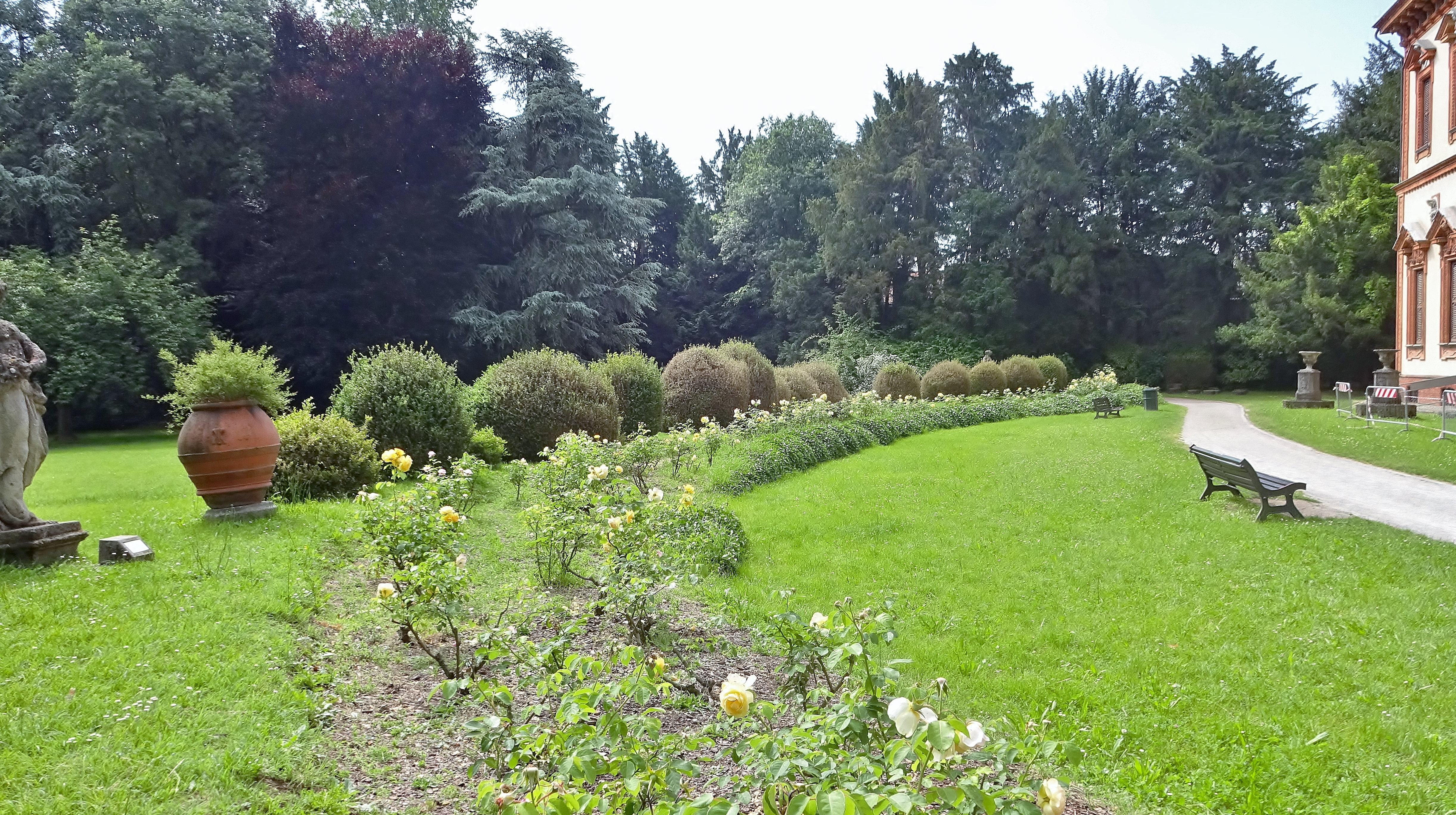 Villa Ghirlanda Silva (solo esterni) This is a photo of a monument which is part of cultural heritage of Italy.